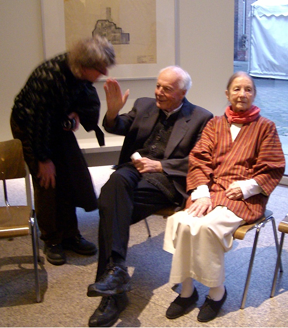 Gottfried Böhm mit seiner Ehefrau Elisabeth Böhm bei der Ausstellungseröffnung zu „Felsen aus Beton und Glas“ in Köln, 2009